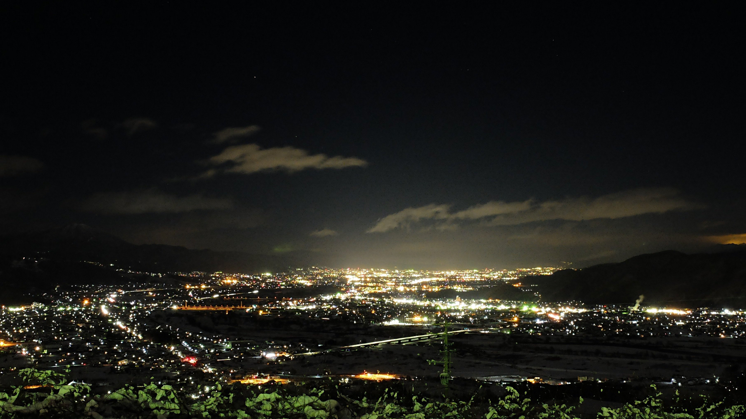 姨捨SA上り線より千曲市方向